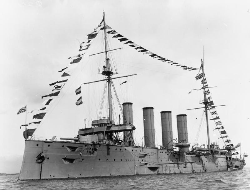 HMS DRAKE.